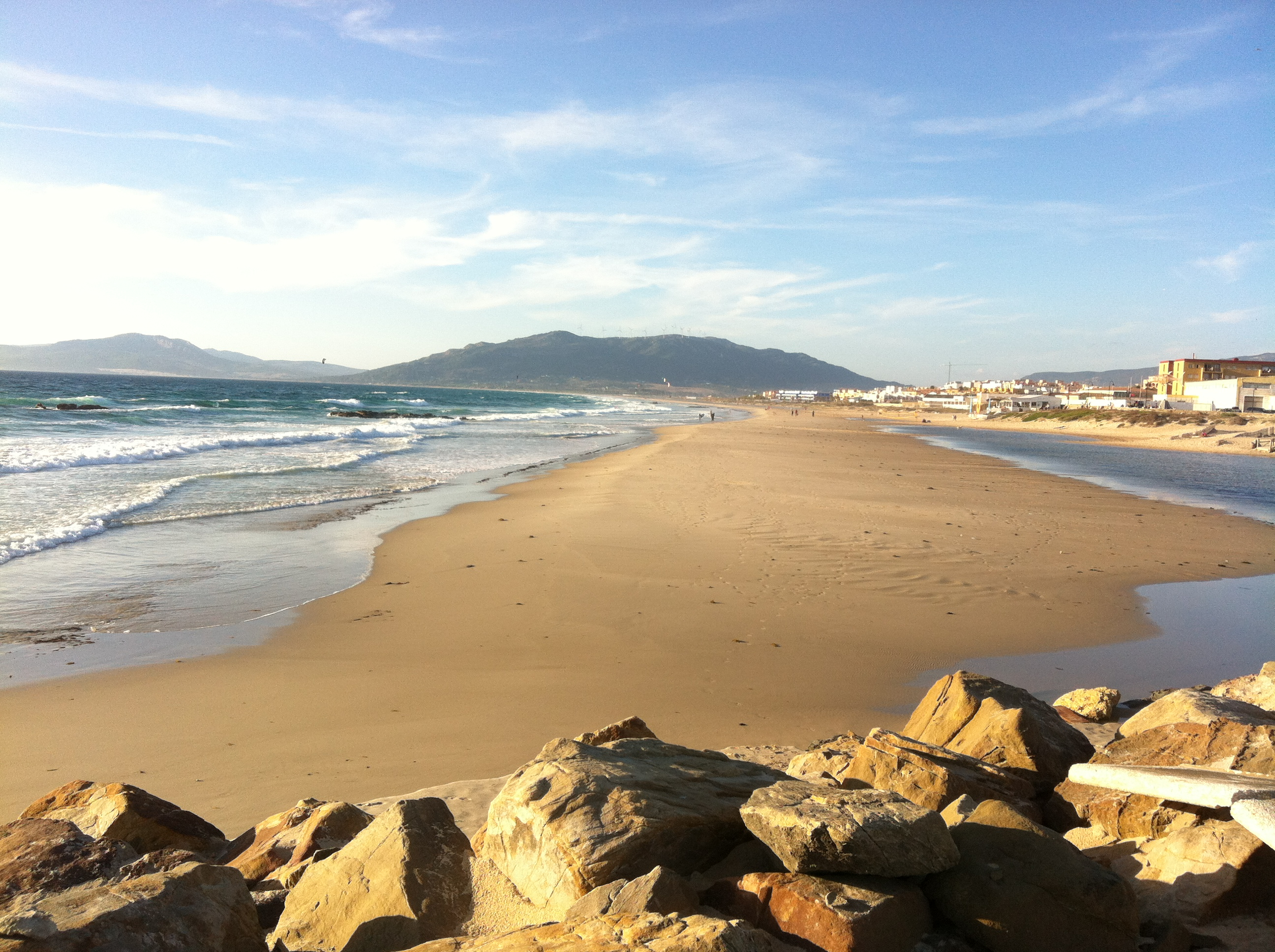 Tarifa Playa de Los Lances - 05